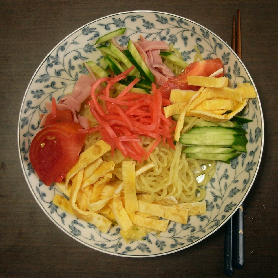 夏はこればっかり食べています。